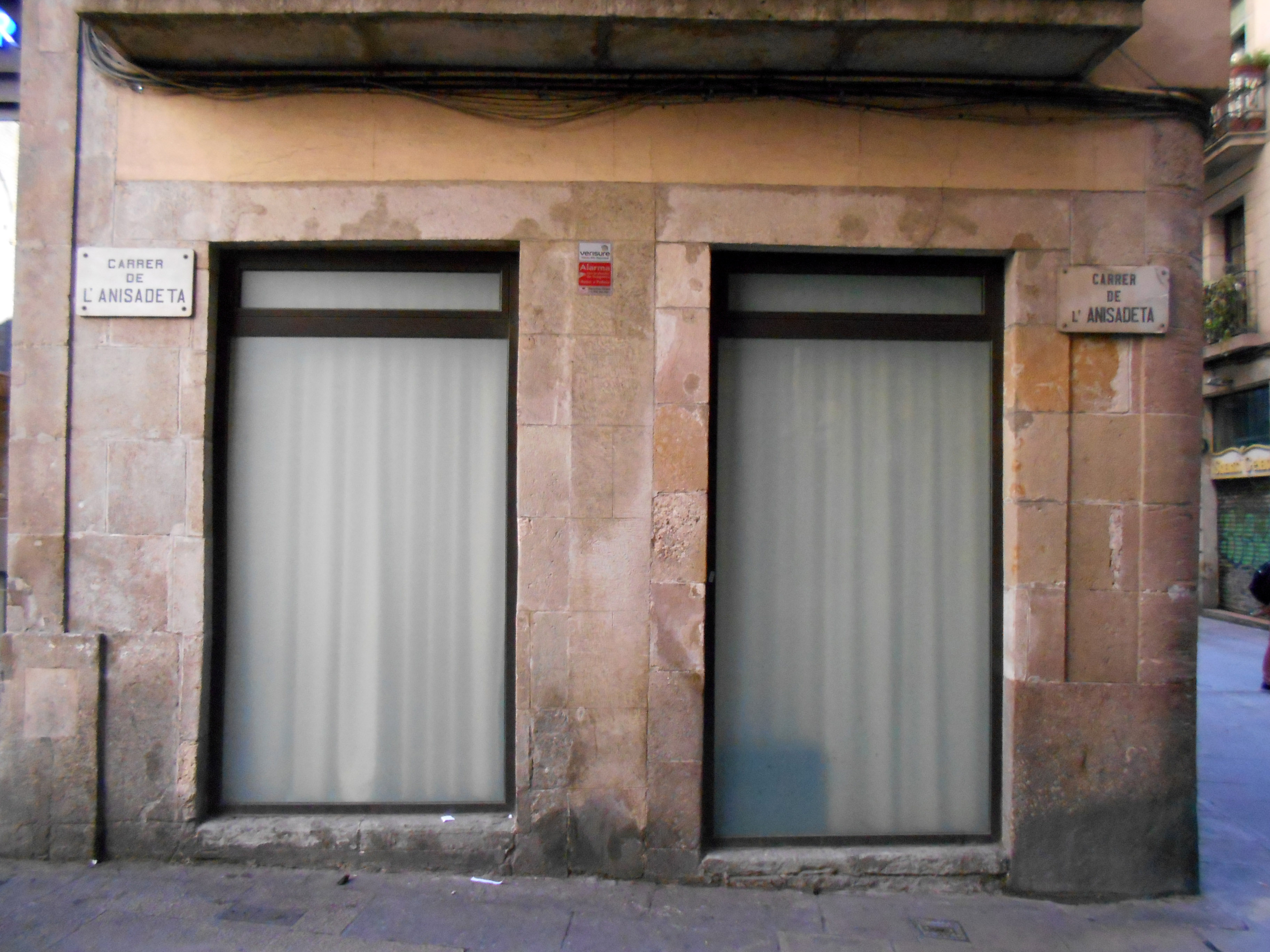 Calle de la Anisadeta.